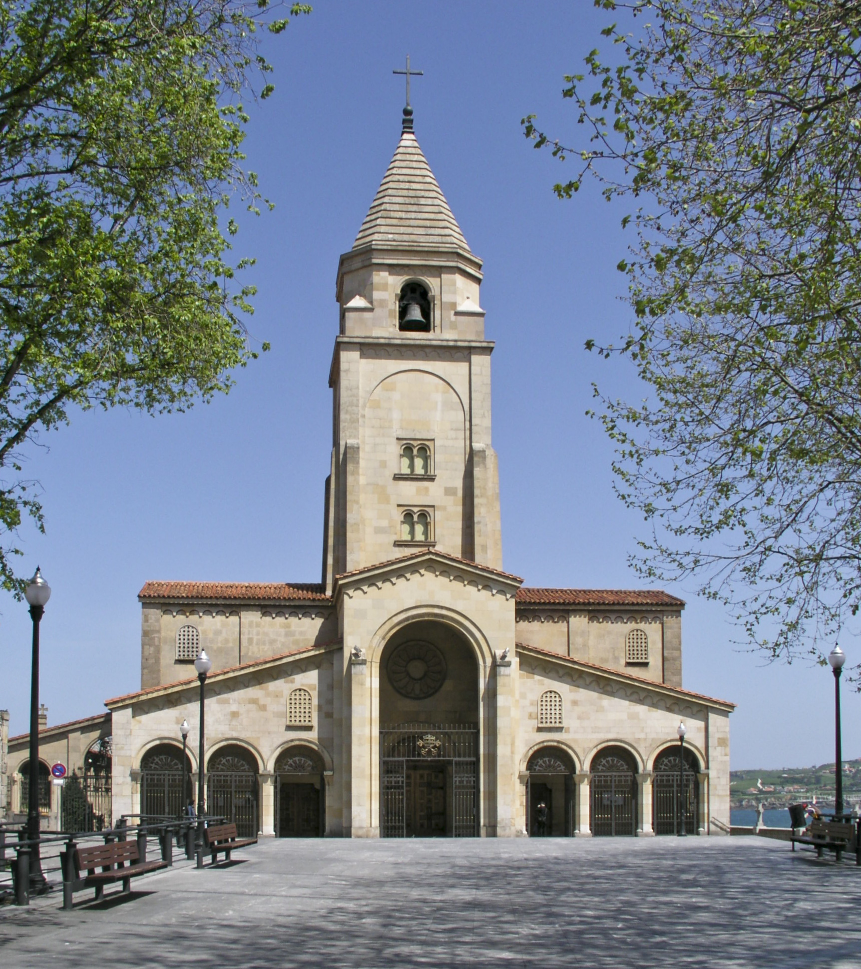 Iglesia San Pedro Apóstol, Gijón